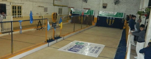 Instalaciones